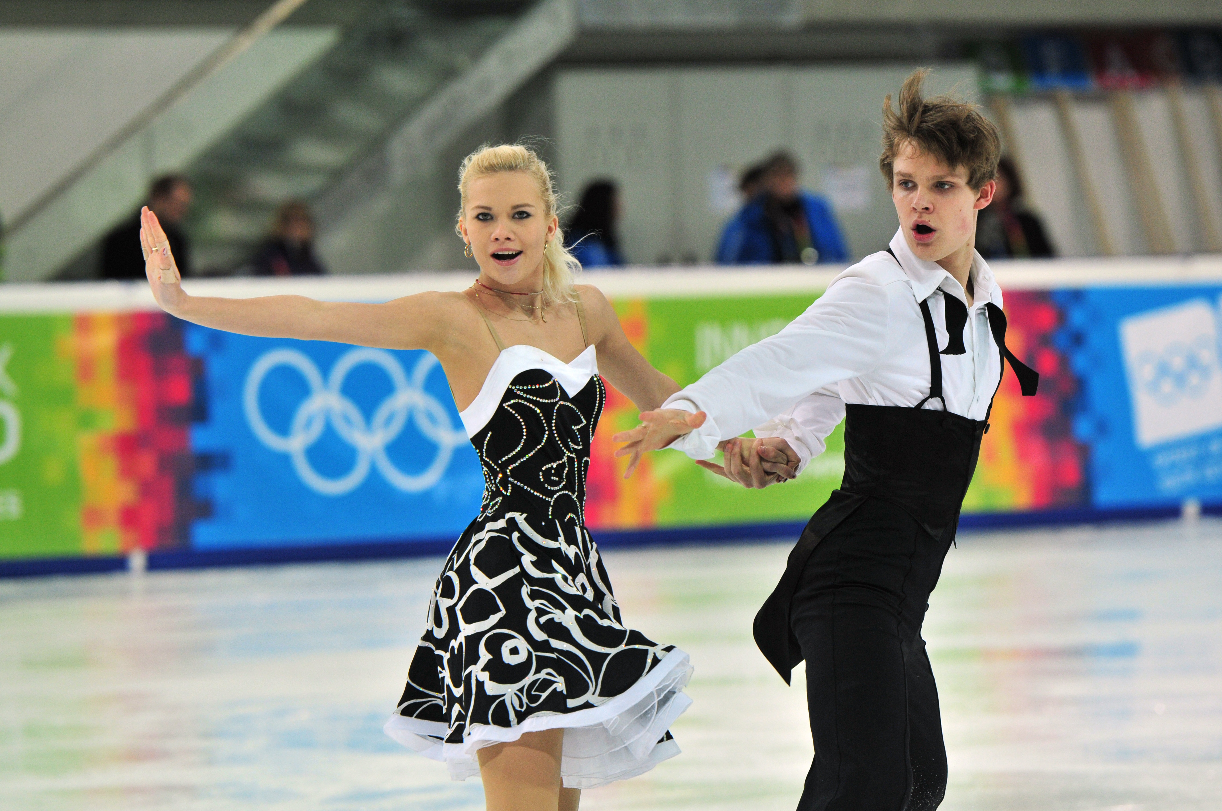 1. Jugendolympiade 2012 Innsbruck, Jana Čejkova & Alexandr Sinicyn (CZE)